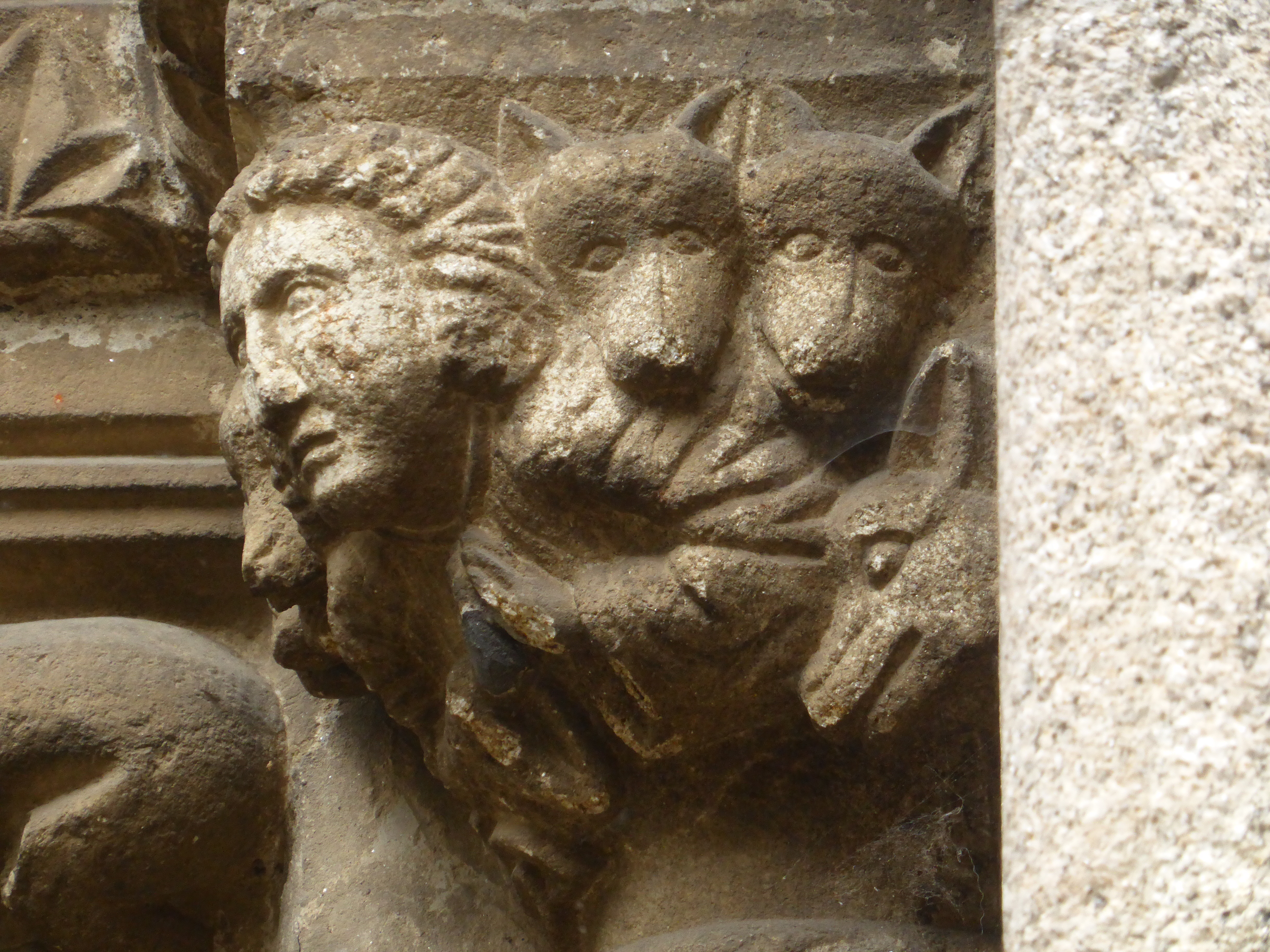 En la portada principal de la iglesia de Santiago, de Betanzos, se encuentra a la derecha este capitel, donde un personaje está rezando, rodeado por cinco lobos.